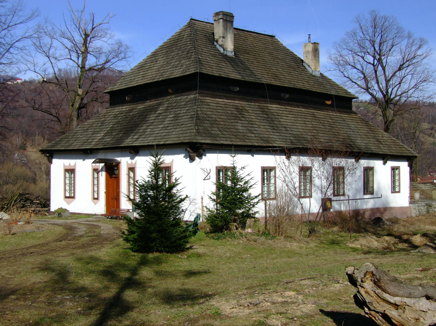 Laskowa (województwo małopolskie). Dwór z XVII w.